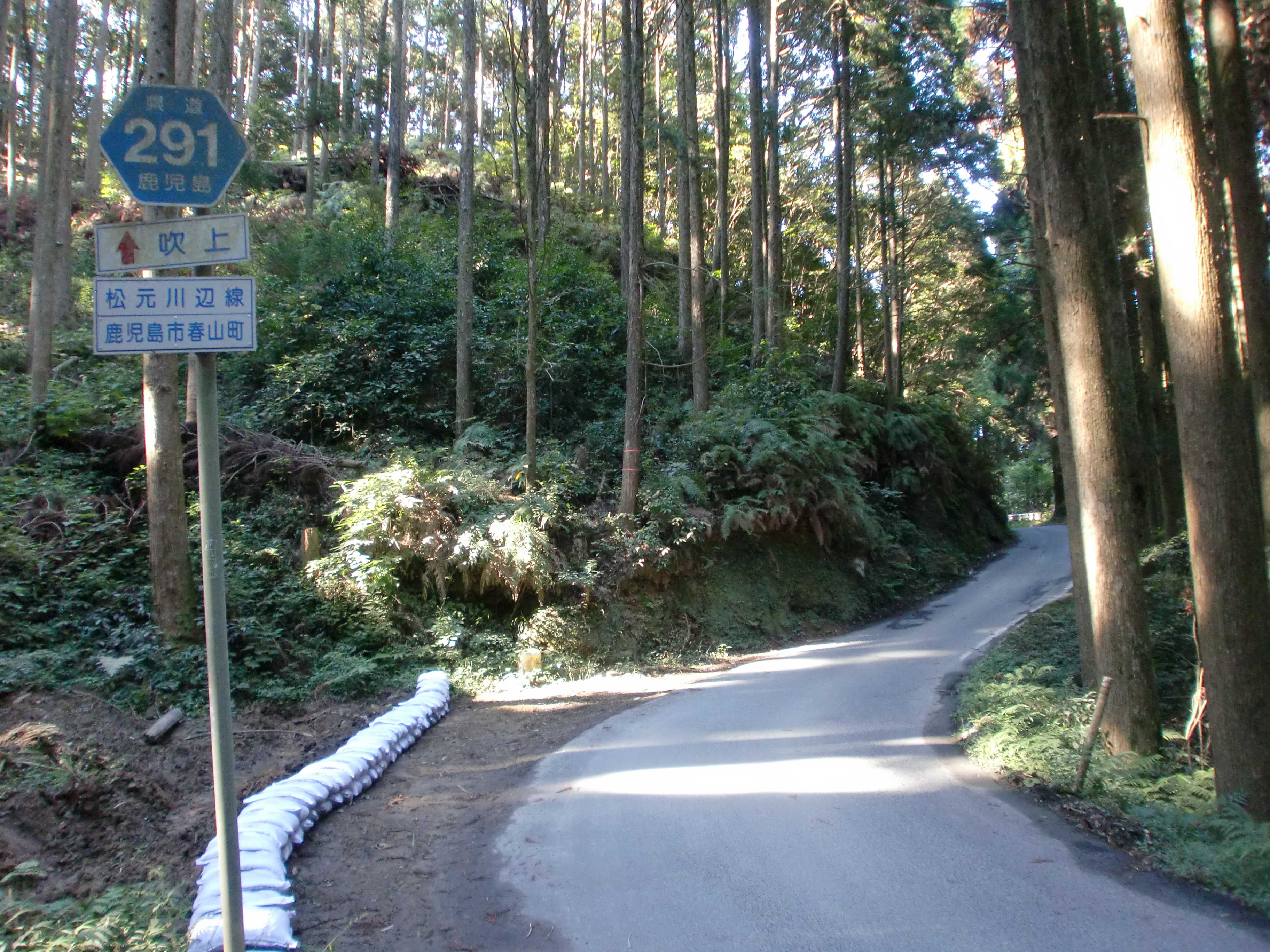 鹿児島県道291号松元川辺線を鹿児島市春山町から川辺方面を望む